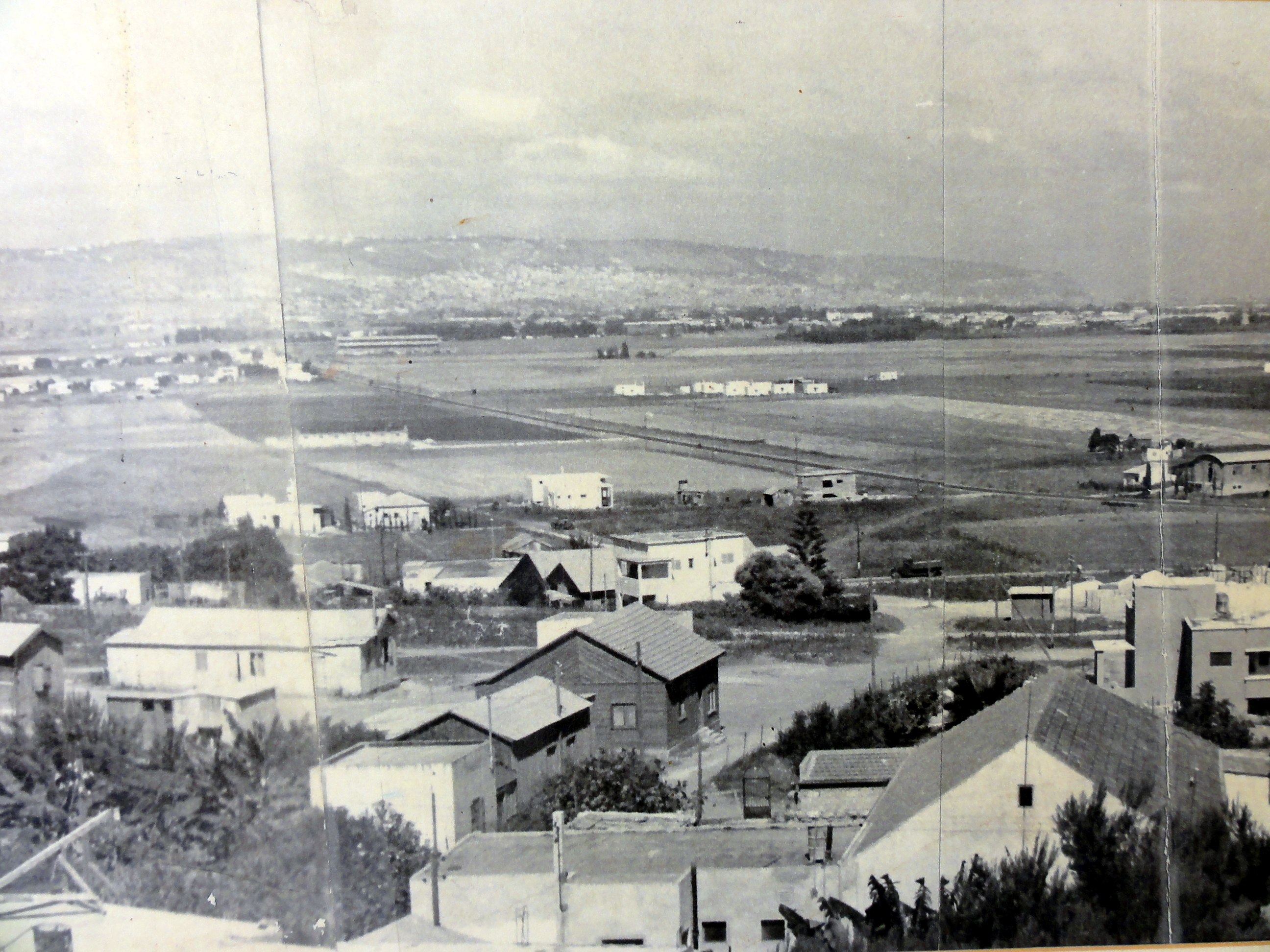 תמונה פנורמית של כפר אתא, 1947, המוצגת בבית פישר בקרית אתא